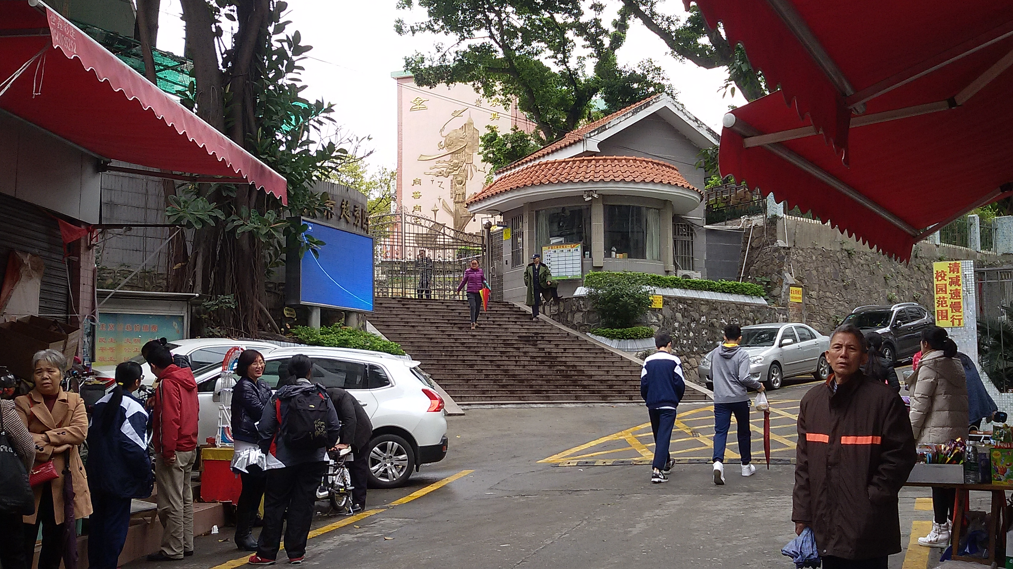 粵語: 廣州市鐵四小學正門